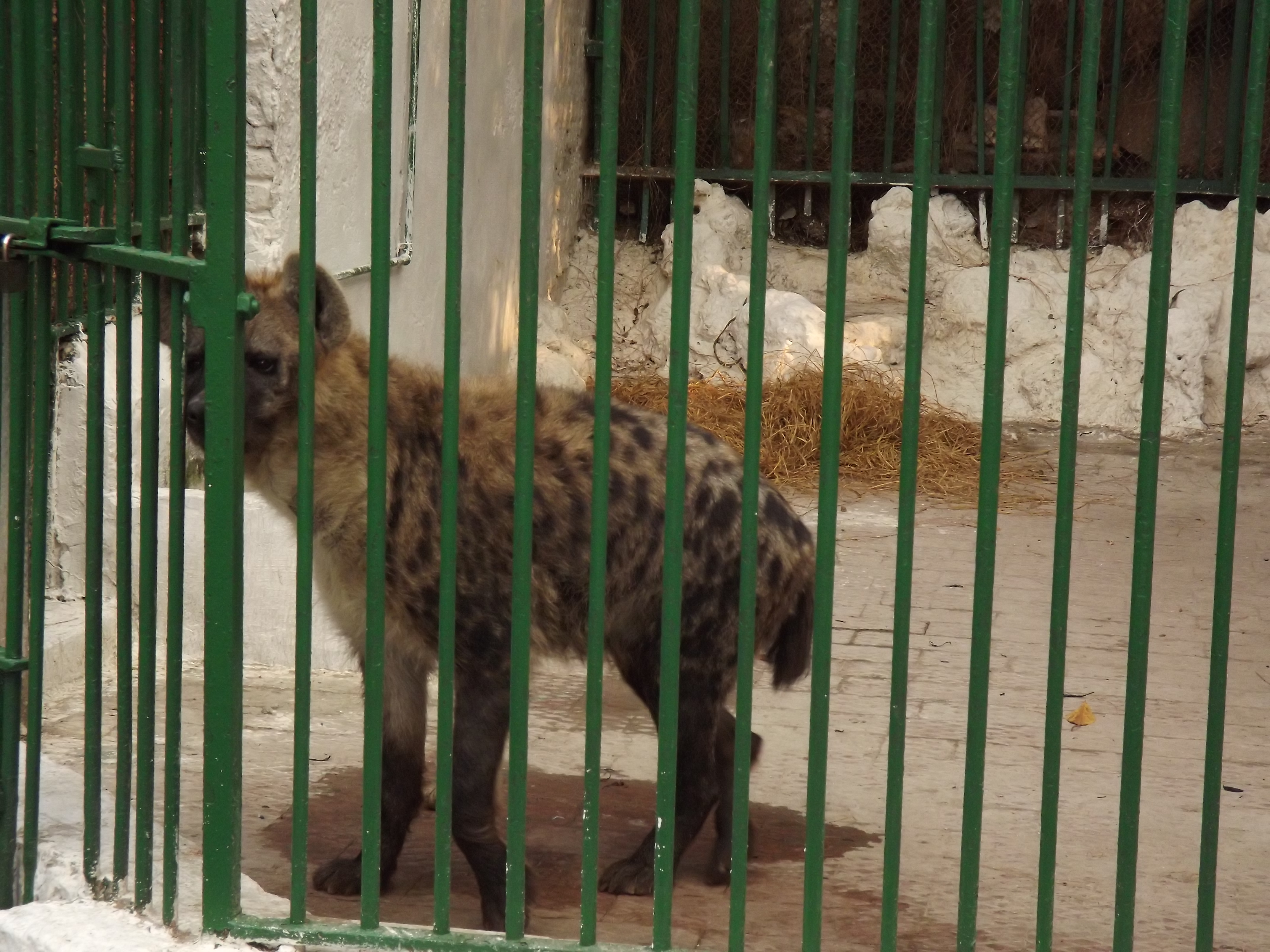 ضبع منقط في حديقة حيوان النزهة - الاسكندرية